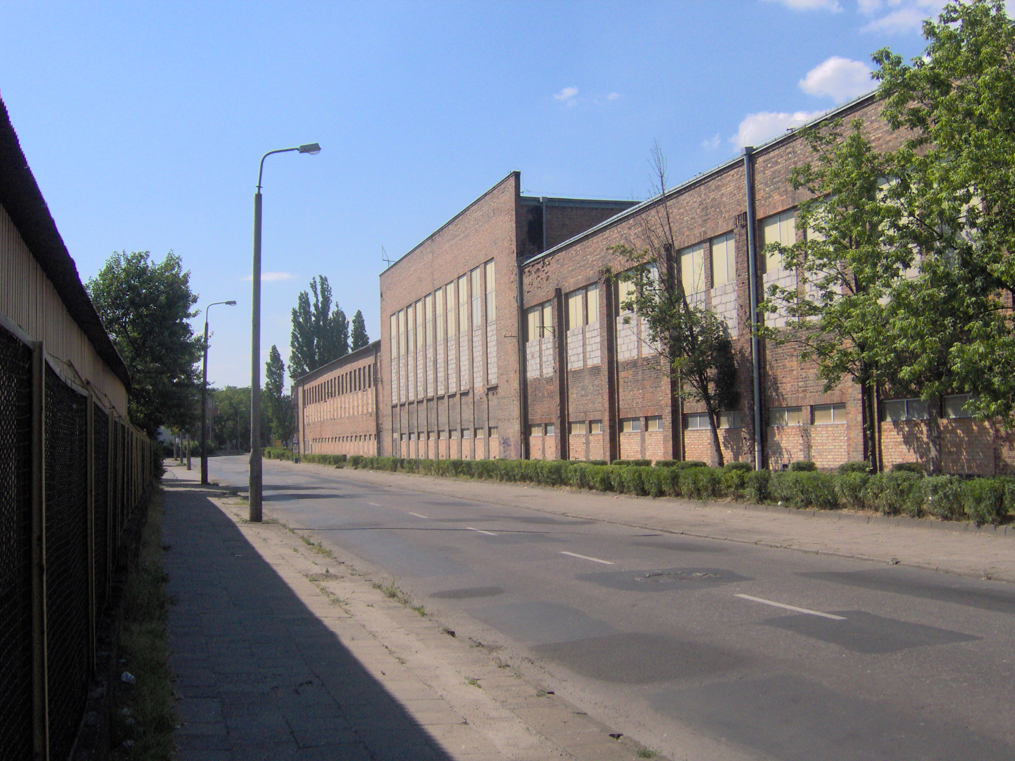 Pozostałości po celulozie (2007 r.)